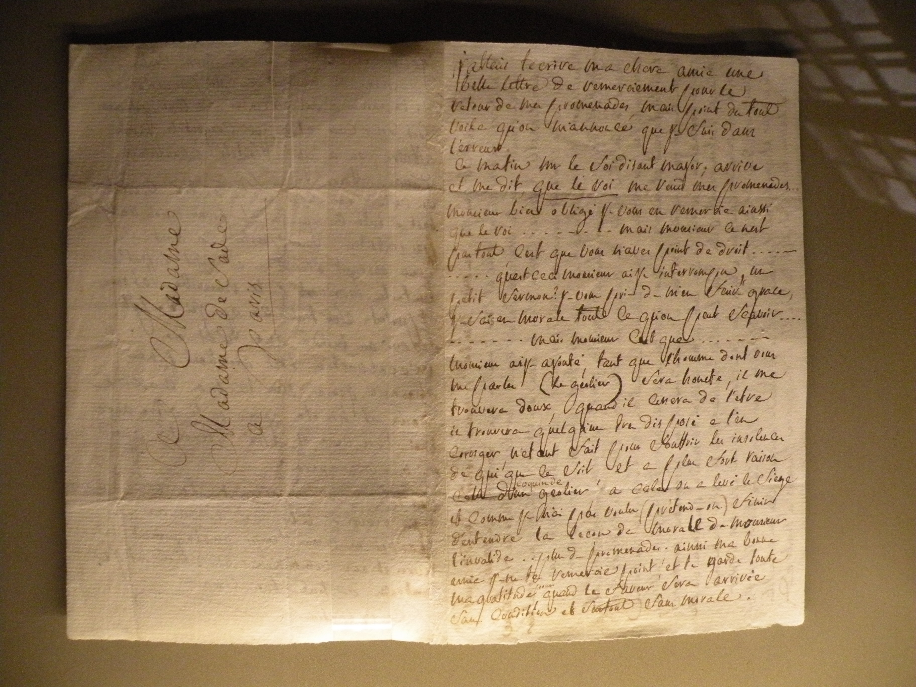 Donjon du Château de Vincennes : cellule du marquis de sade lettre à sa femme